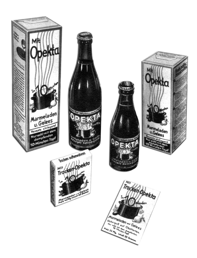 Die Produktpalette Anfang der 1930er Jahre: "Opekta flüssig" und "Opekta trocken"